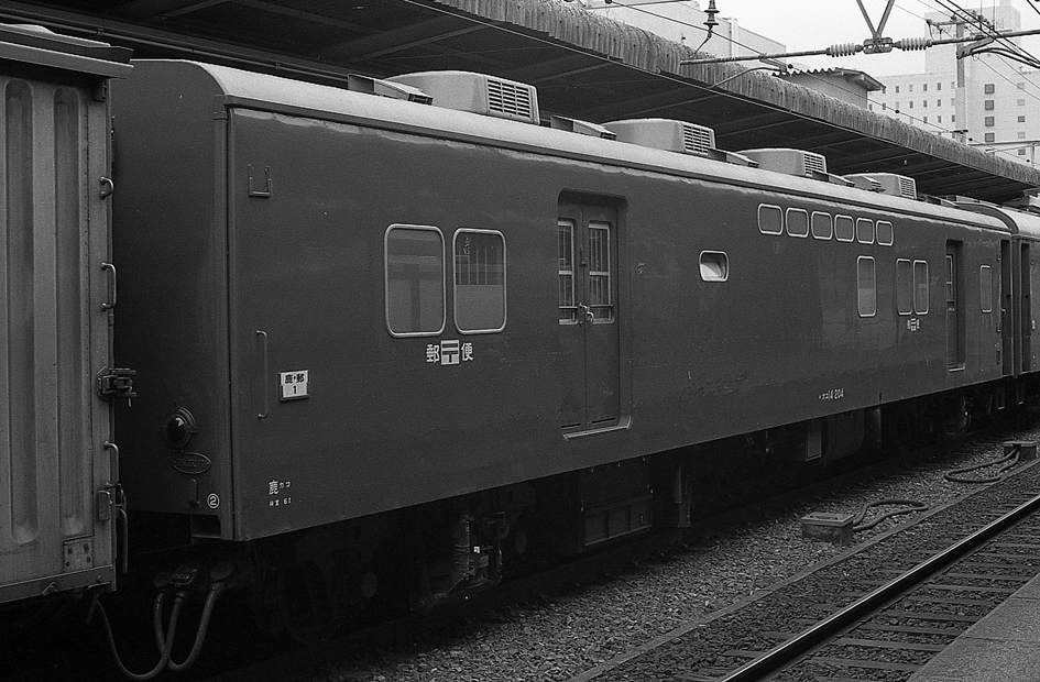 国鉄 オユ14 204